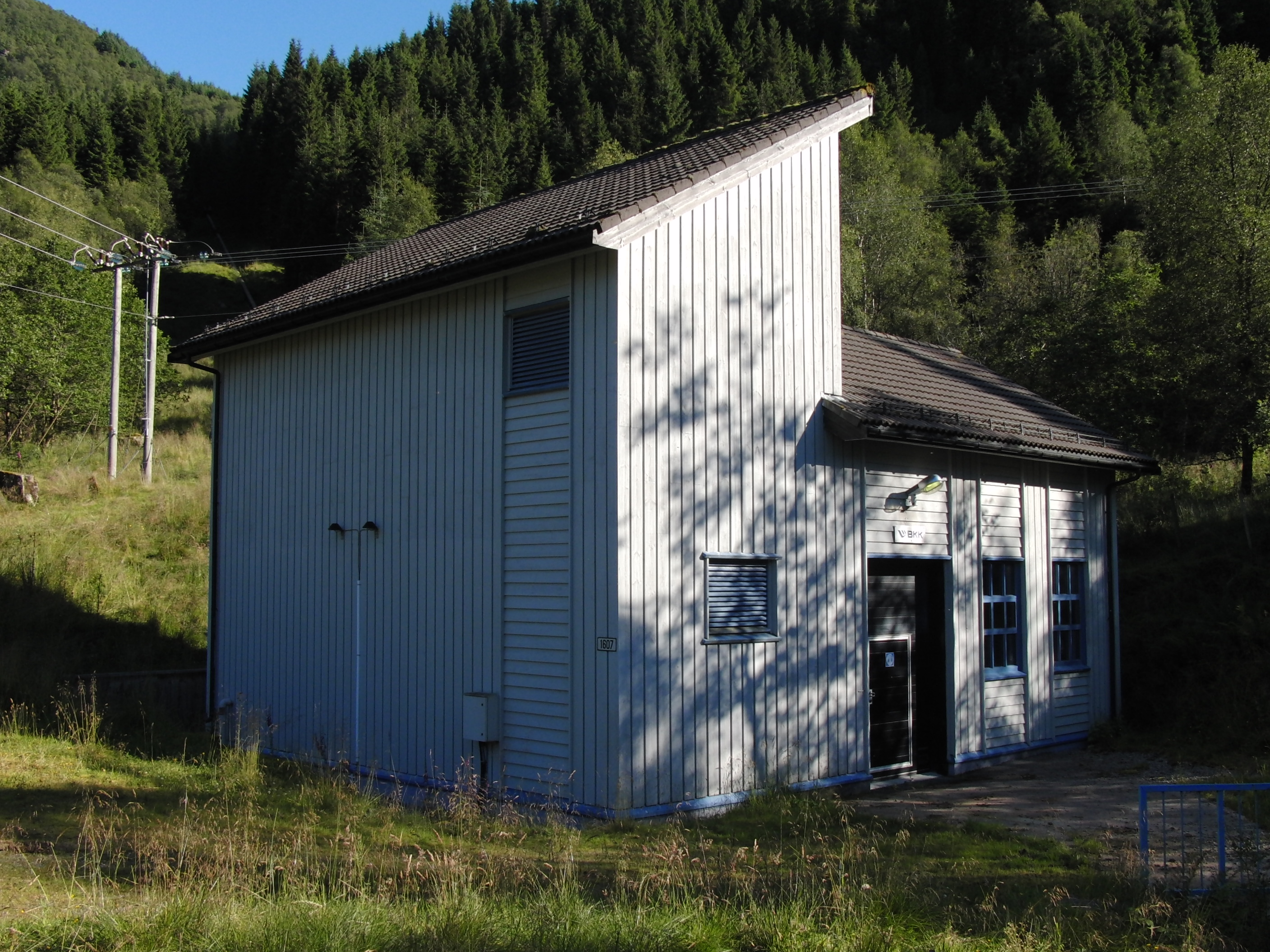 Takle kraftverk